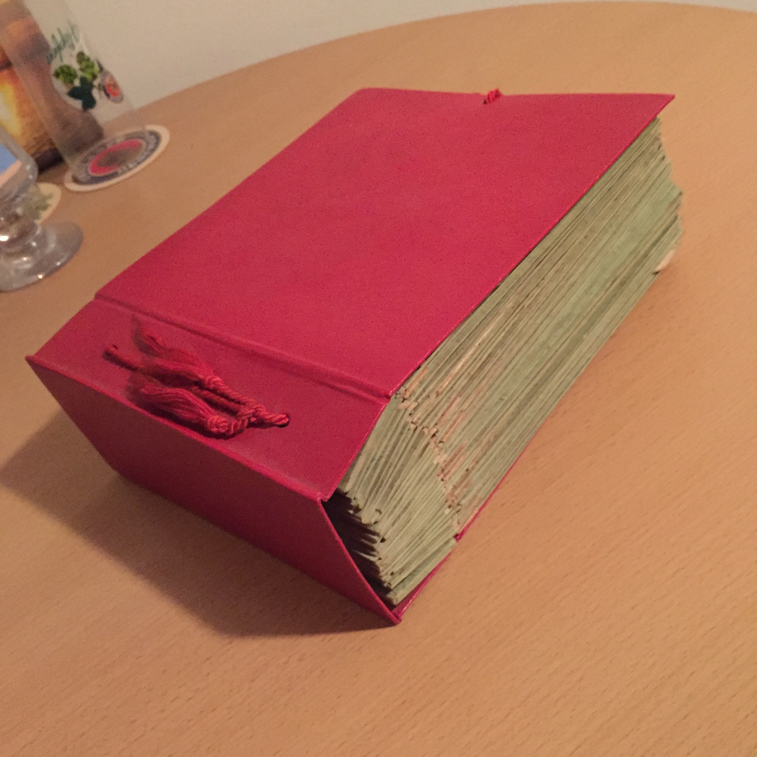 Album für Singles (1950er-Jahre)